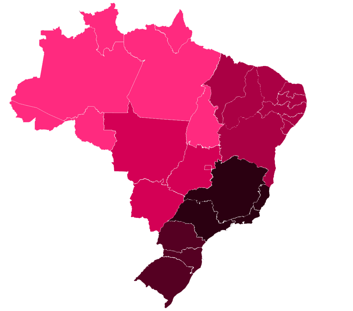 Este é um mapa das regiões brasileiras por PIB em 2015 (Reais)